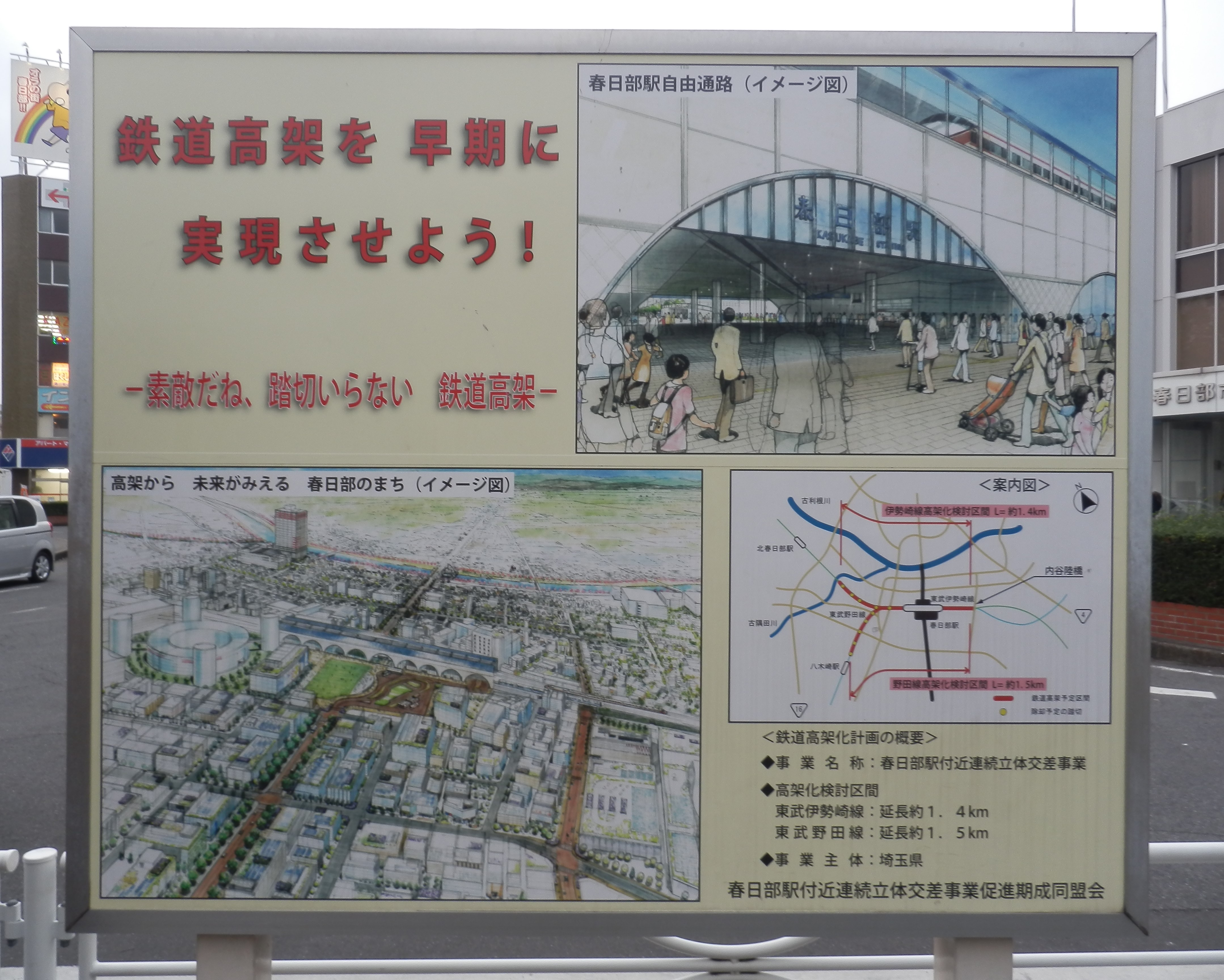 春日部駅西口にある早期立体化を求める看板